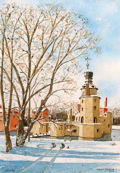 Havré, ruines du château des princes de Croÿ (XV/XVIe siècle)./ de Croÿ castle ruins (XV/XVIth century).